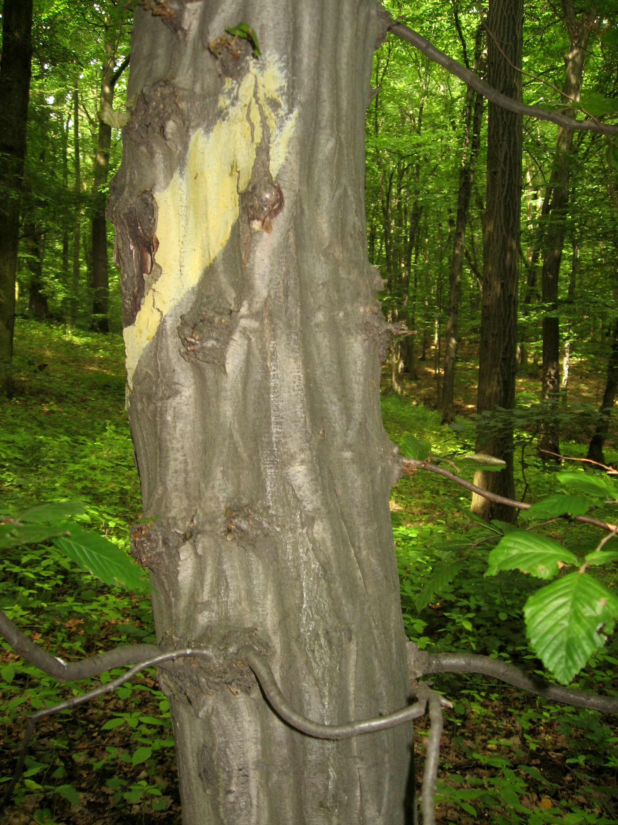 Kmen stromu Carpinus betulus